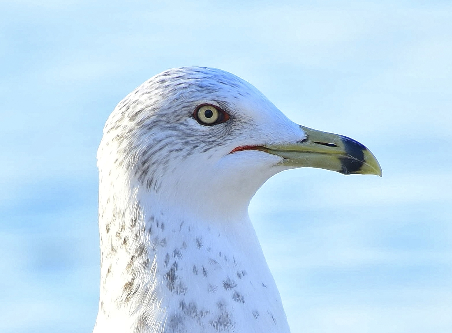 Мартин делеверський (голова). Виразне темне кільце навколо дзьоба є характерною видовою ознакою